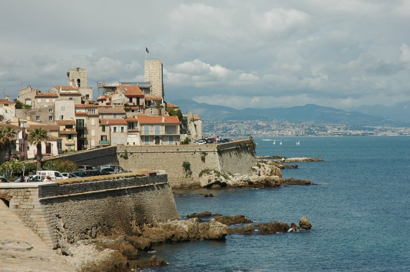 Les remparts Vauban du vieil ANTIBES